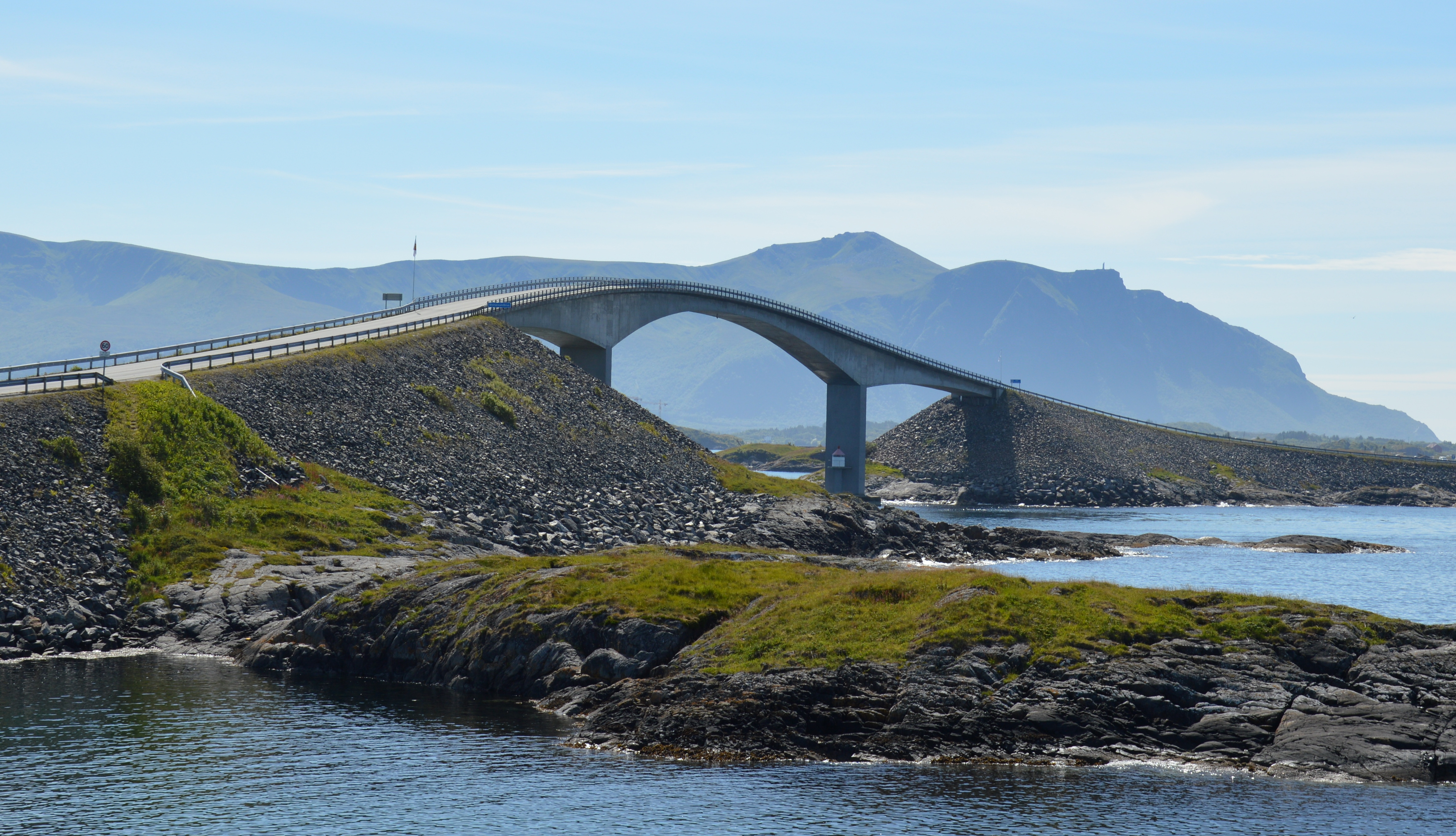 Storseisundbrua